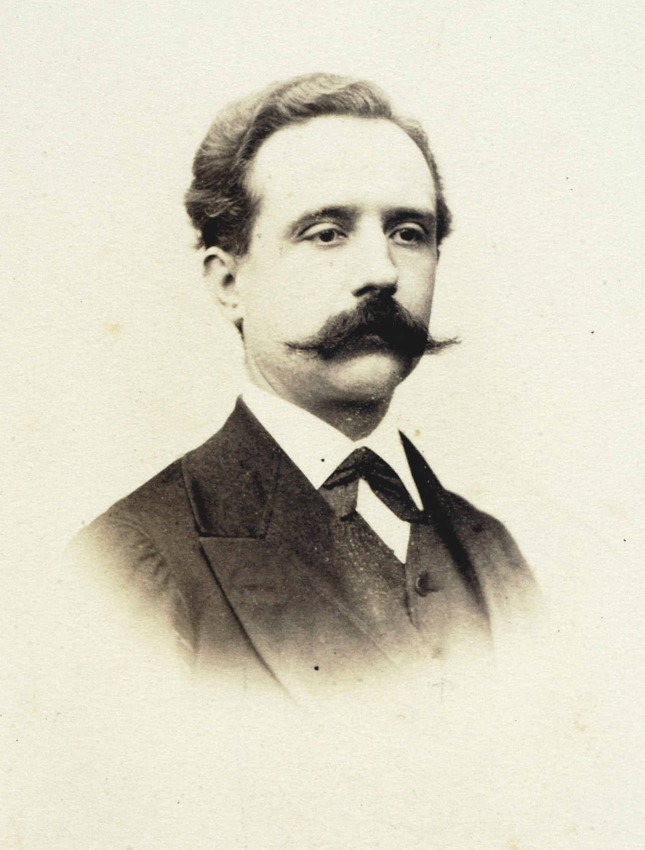 Edward Jan Habich, ok. 1870 r.